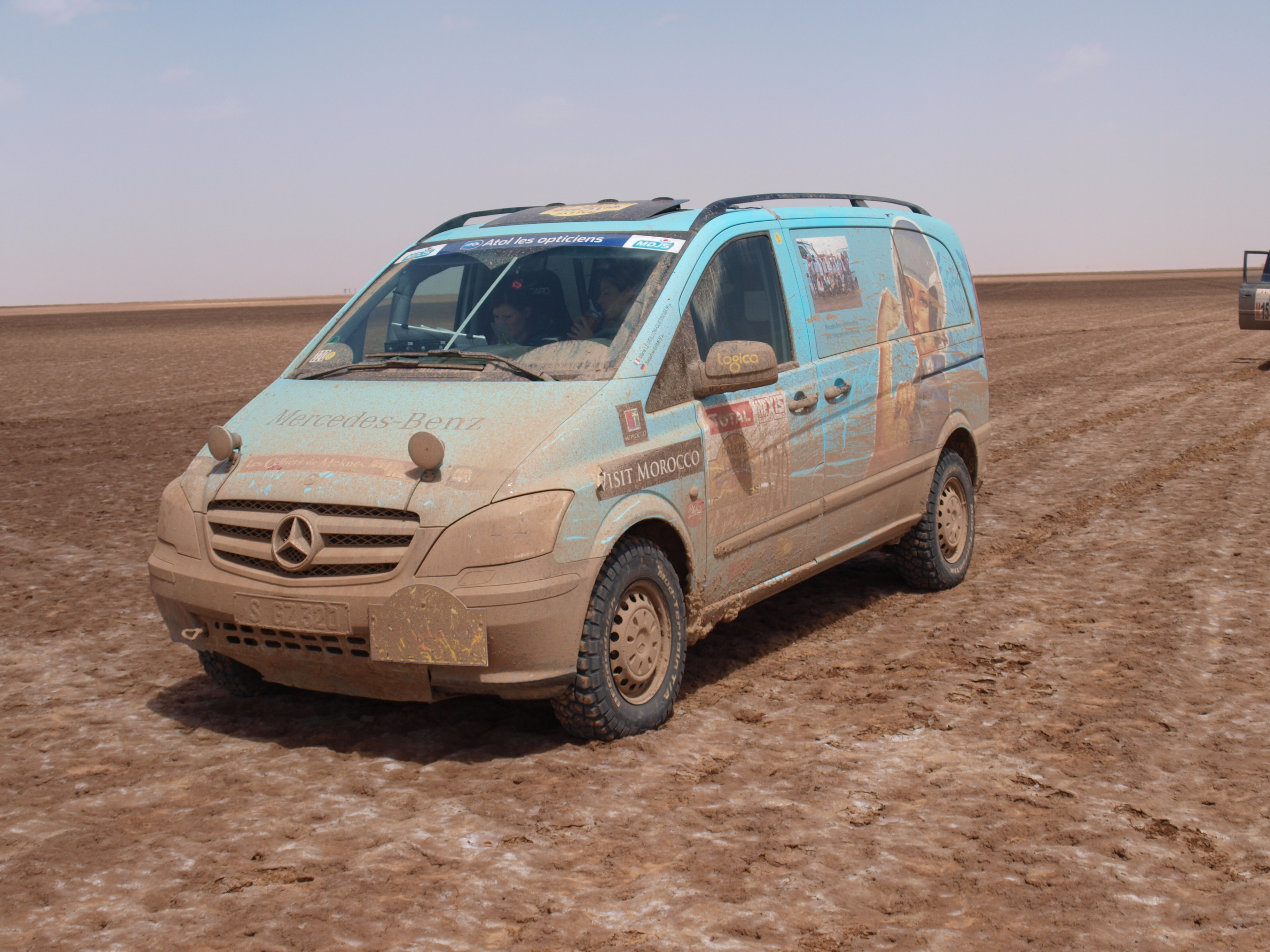 2012 Team 320 Mercedes-Benz Vito 4x4